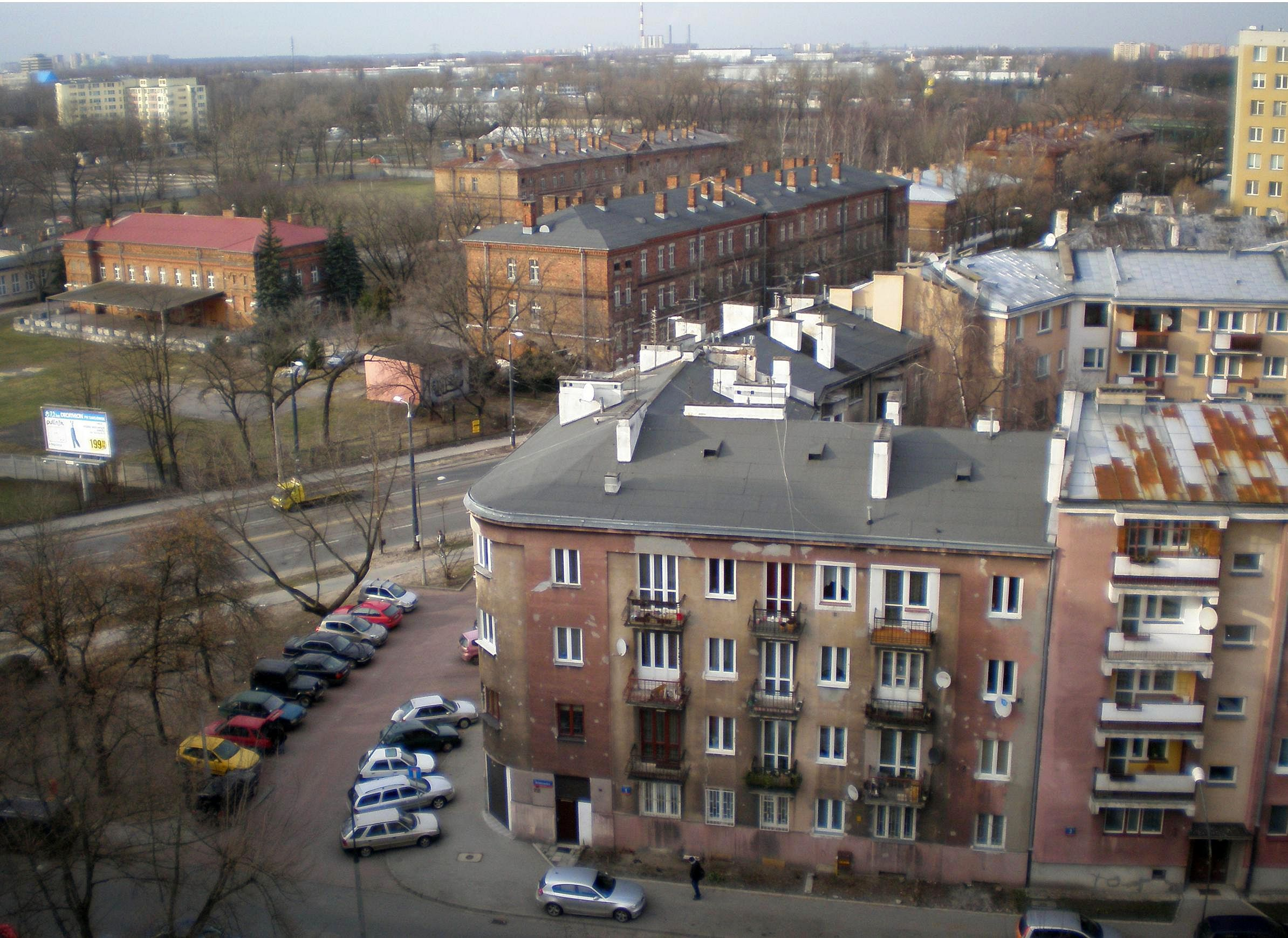 Ulica 11 Listopada w Warszawie, koszary